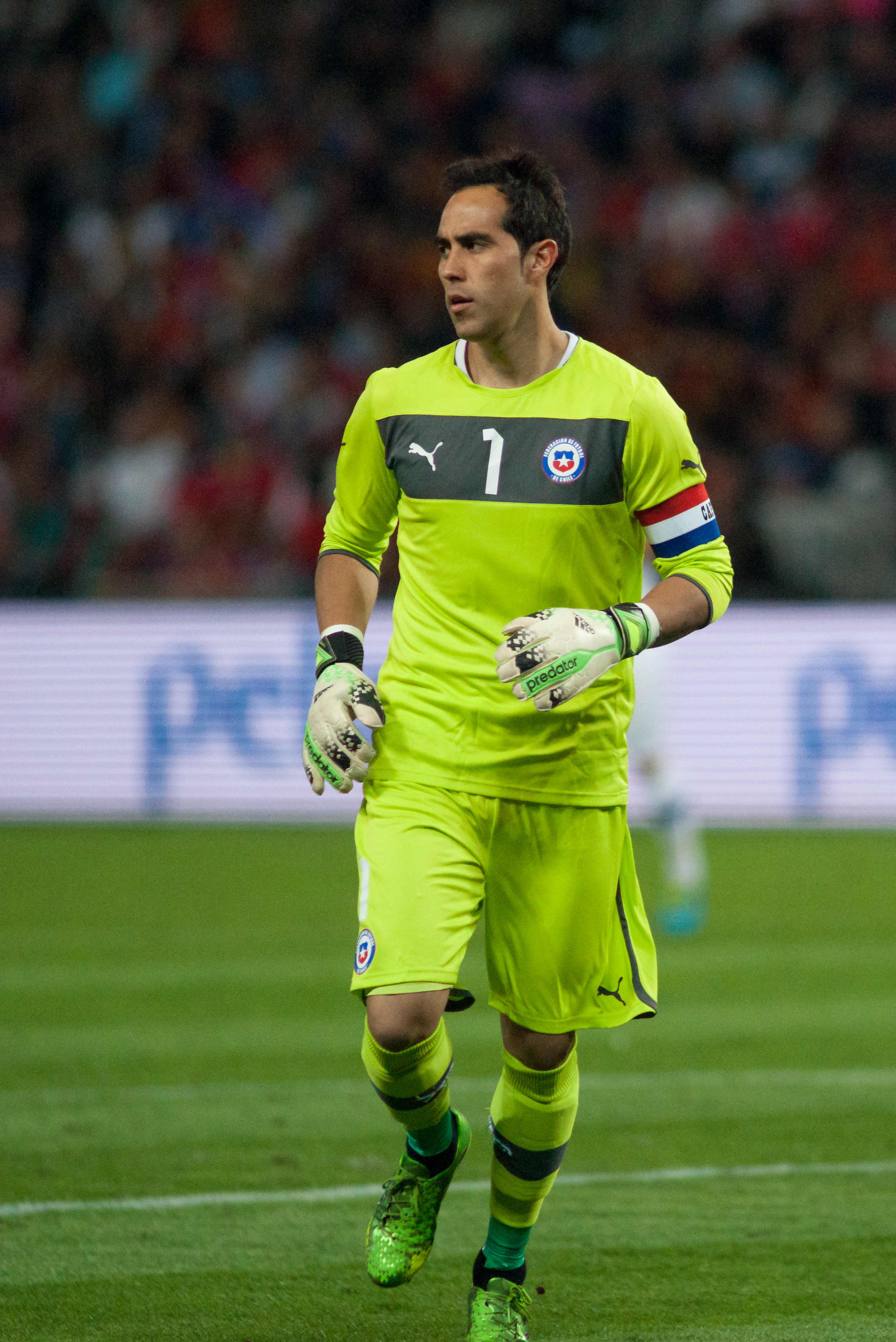 Espagne - Chili, 10 septembre 2013.